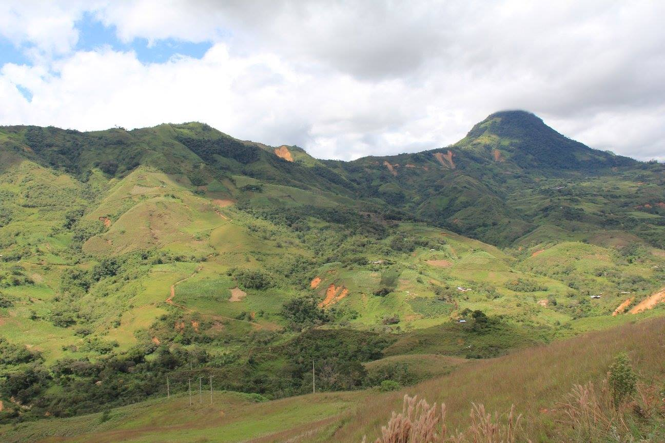 Es una imagen panorámica que visualiza el relieve de una determinada zona geográfica llamada Callayuc, una entidad administrativa subnacional de Perú. autoria propia.